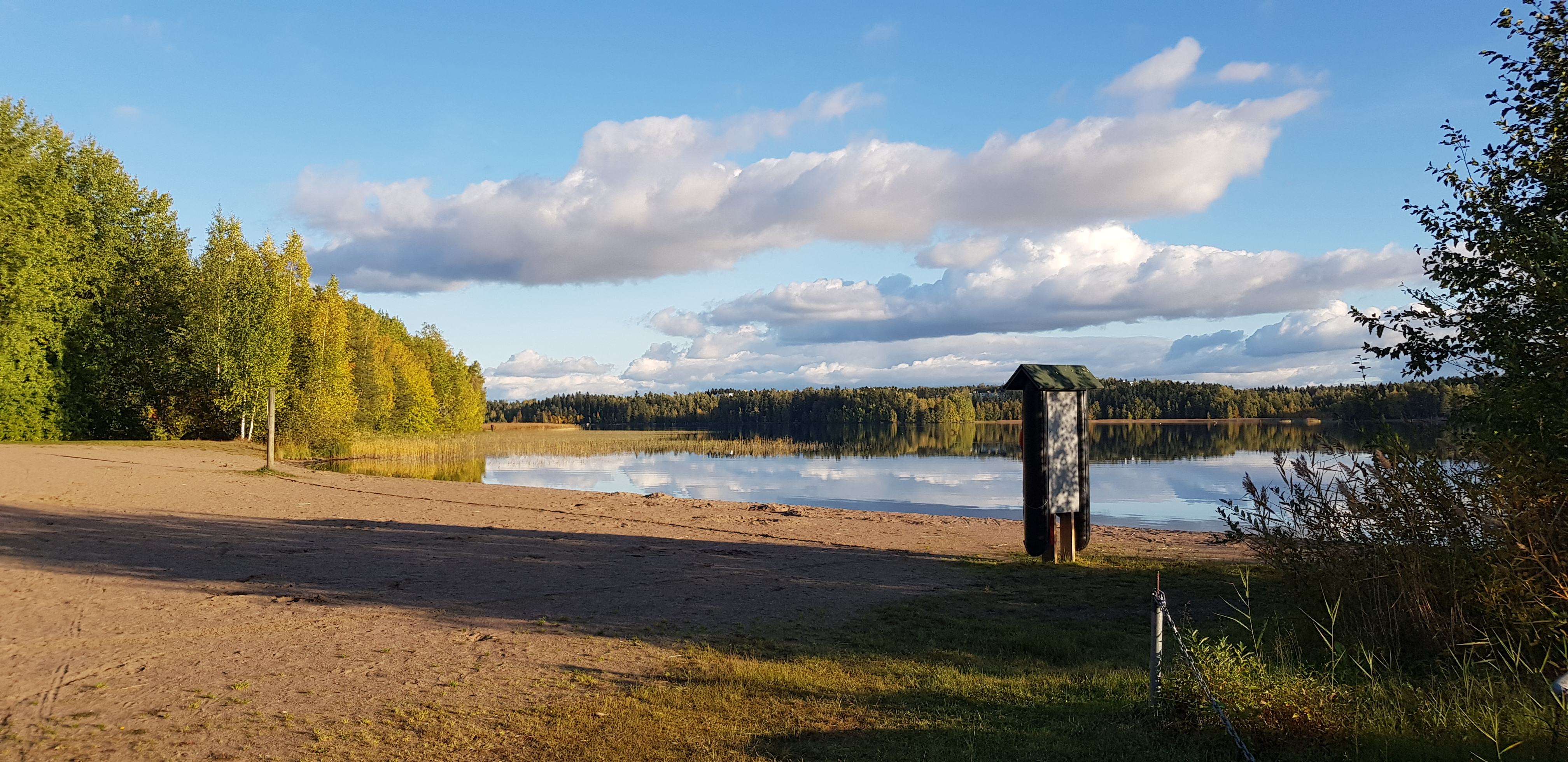 Siivikkalan uimaranta